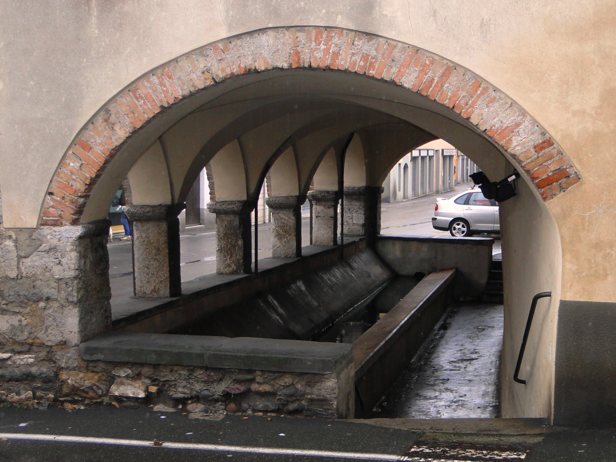 Albino (BG), via Mons. Carrara, lavatoio alimentato con le acque del torrente Rio Re